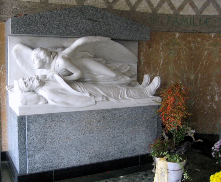 Gruppo marmoreo opera di Giannino Castiglioni Cappella funeraria Enea Mattei - Morbegno (So)